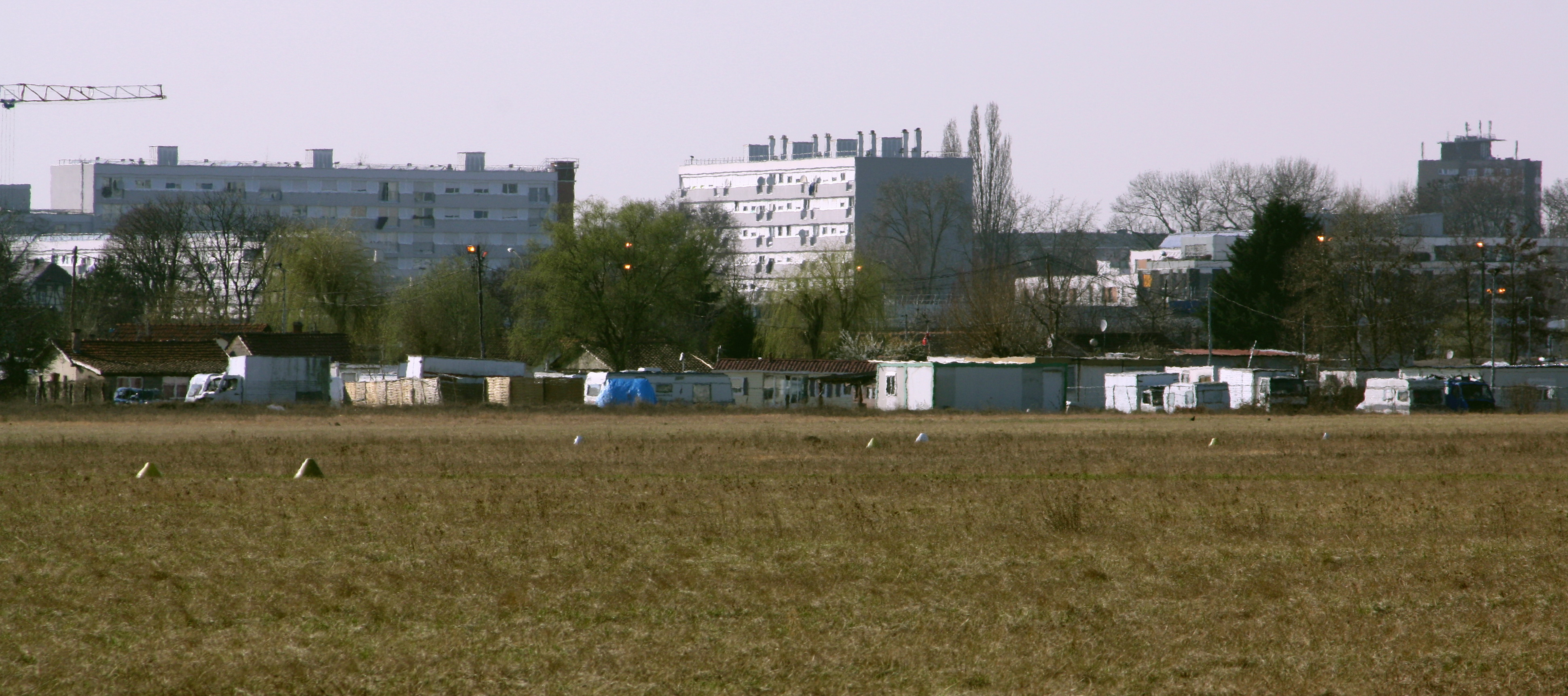 Camp Polygone - ein Baracken und Wohnwagenlager von Romas in Straßburg. Im Vordergrund ein Flugfeld.